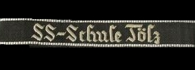 Description=Aermelbandabzeichen Junkerschule Bad Tölz. Ähnlich wie hier [1] Source=self-made Internet Edit Date=heute Author= MyName (Trompet) Trompet